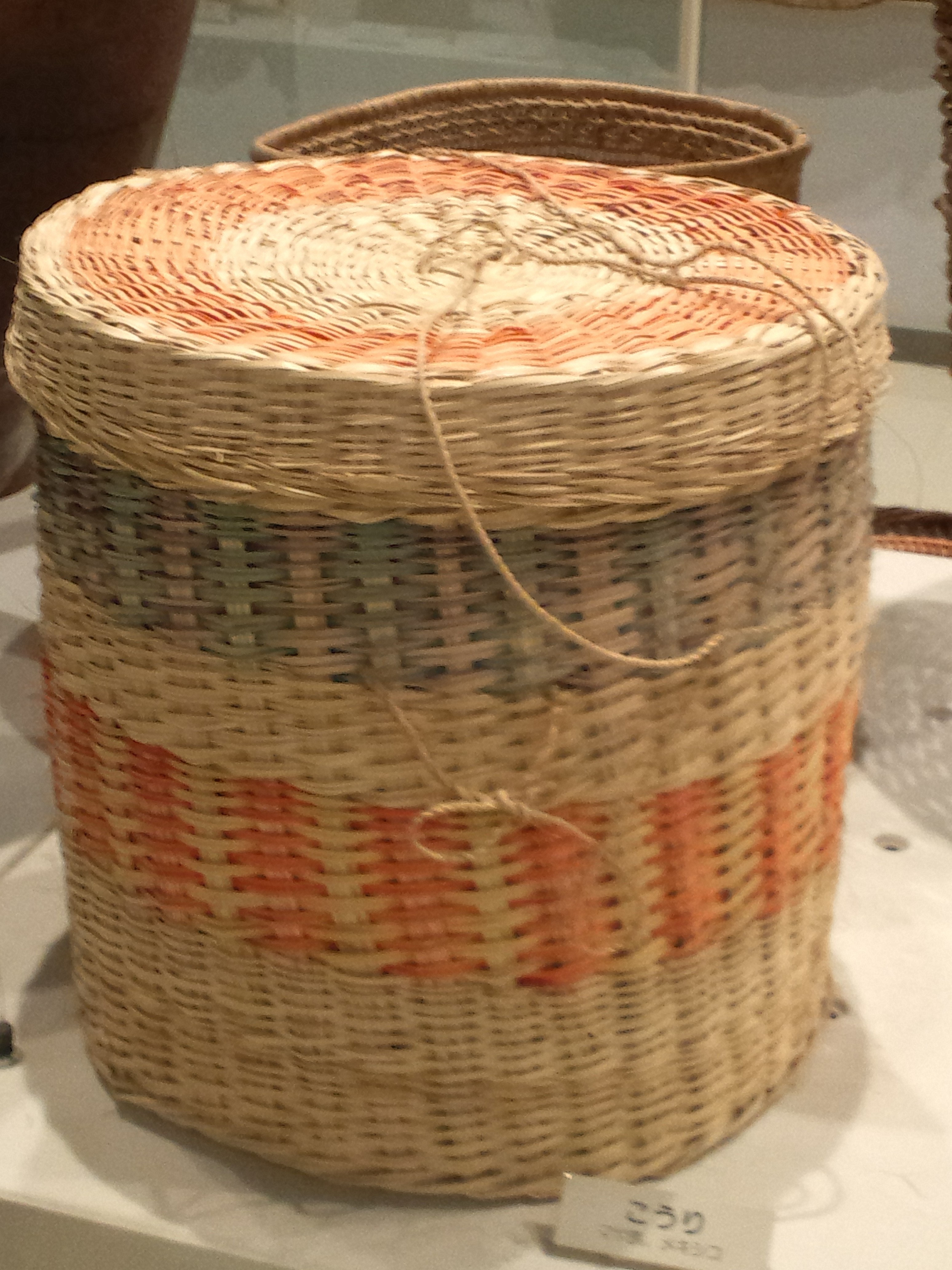 リトルワールド 本館展示室 行李（メキシコ、マヤ族）